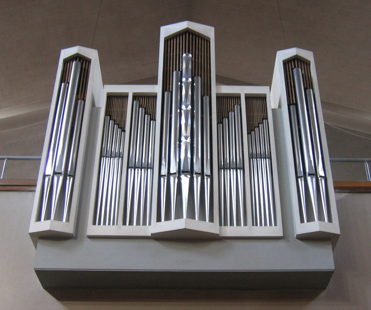 Den Réckuergelpositiv an der Paul-Gerhardt-Kierch zu München-Laim